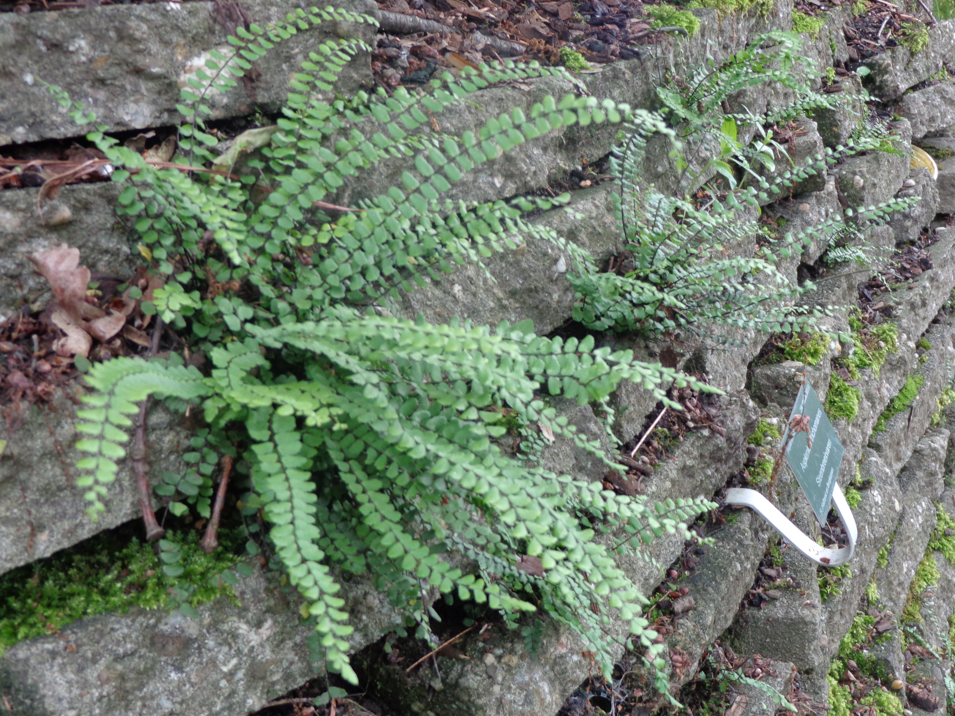 Steenbreekvaren in de botanische tuin Utrecht - Fort Hoofddijk